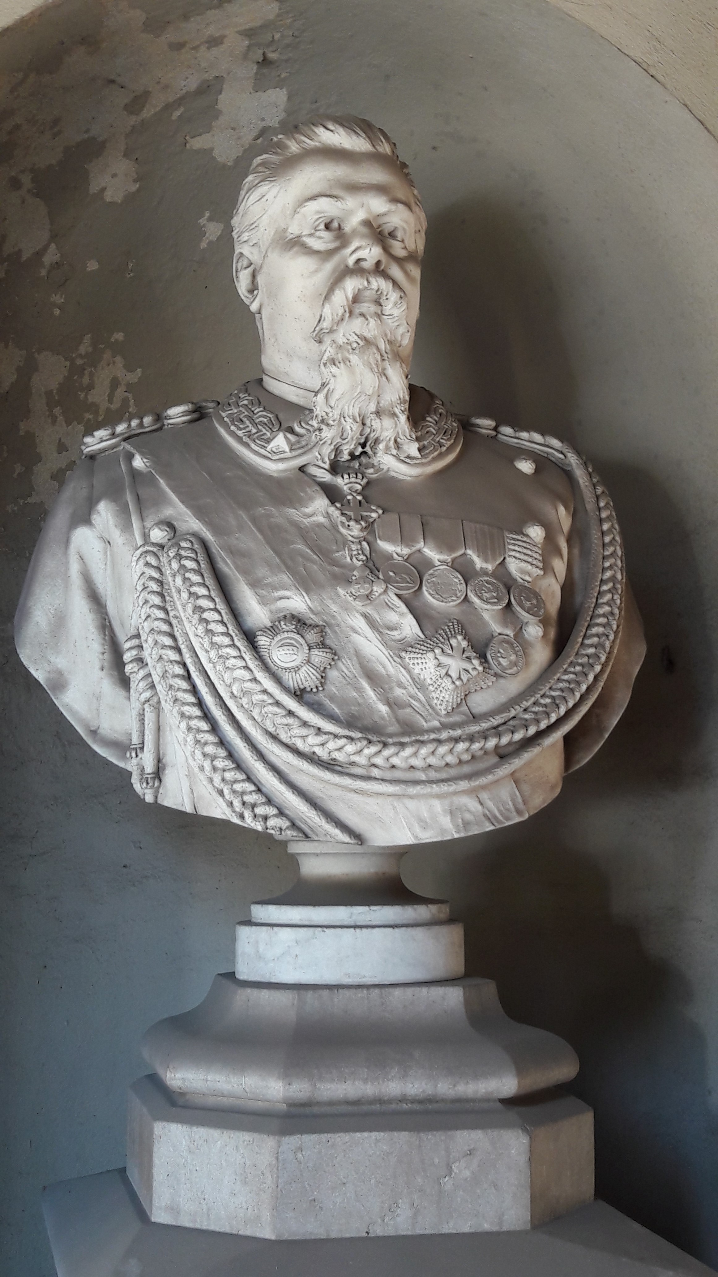 Pavia - Cimitero Monumentale - Pantheon - Busto Gaetano Sacchi This is a photo of a monument which is part of cultural heritage of Italy.